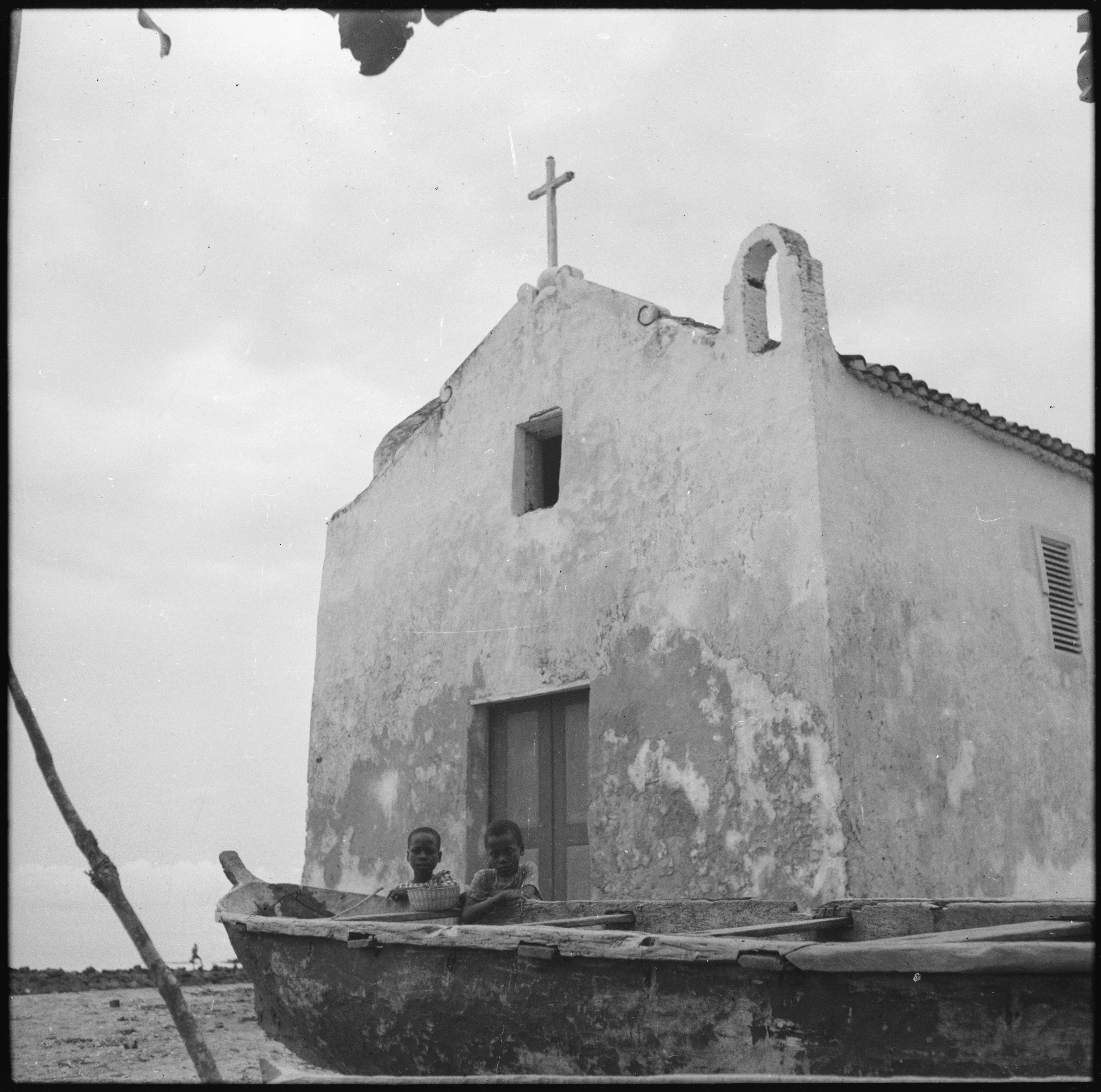 Portugal, San Thomé (São Tomé und Príncipe): Kirche; Alte Kapelle mit zwei farbigen Kindern und Fischerboot im Vordergrund